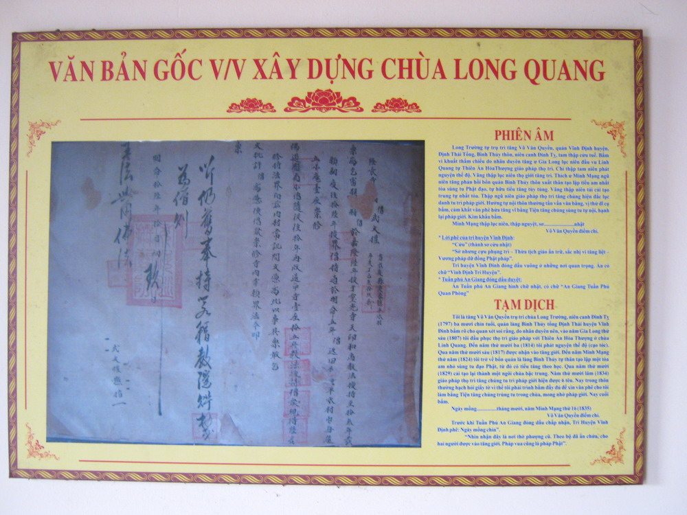 Ảnh chụp tờ đơn chữ Hán xin trùng tu chùa Long Quang (nay thuộc thành phố Cần Thơ, Việt Nam) đang được treo tại chùa. Bản gốc tờ đơn được viết vào năm 1835.